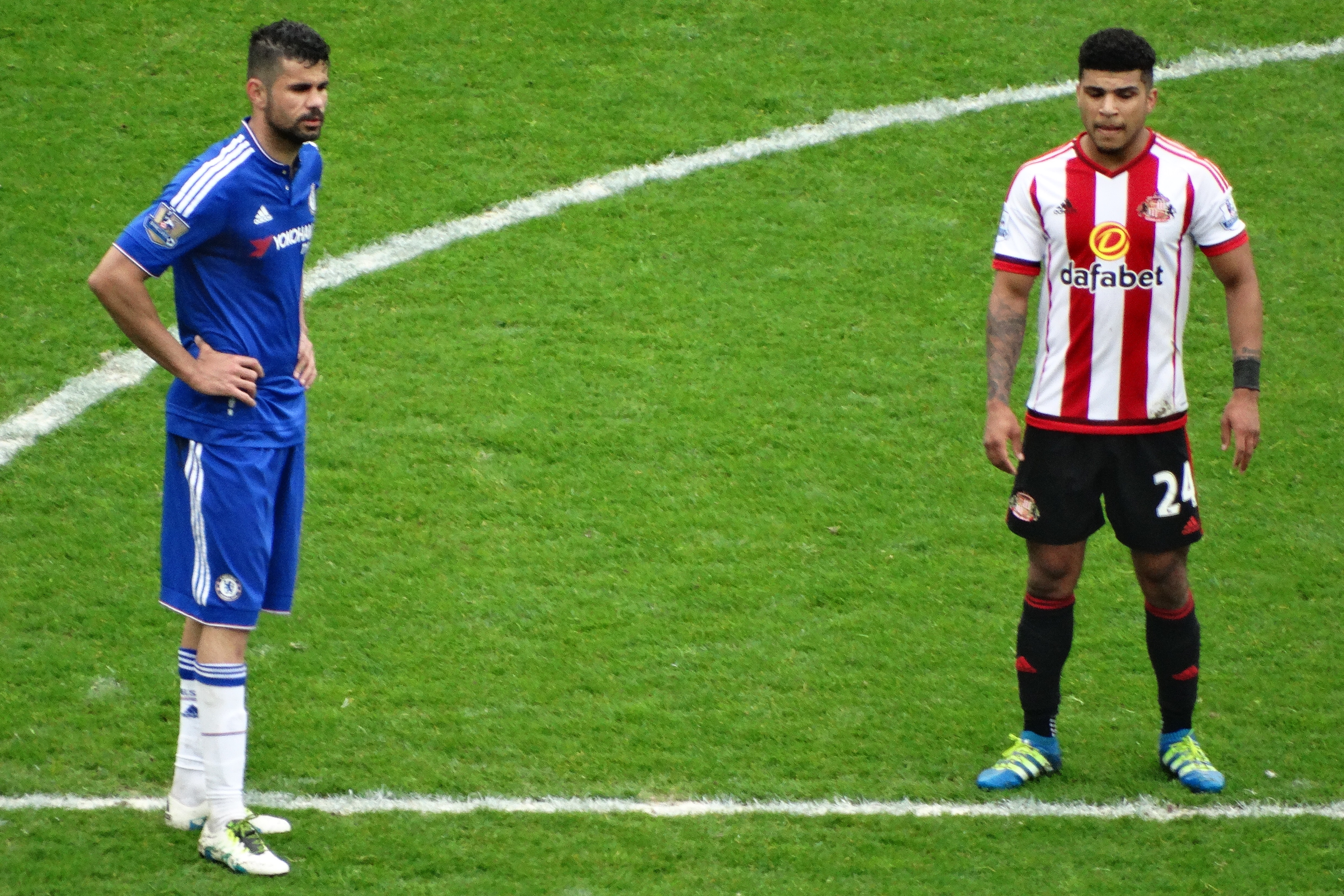 Sunderland 3 Chelsea2